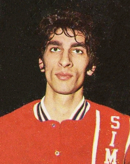 CAMPIONI dello SPORT 1973/74-Figurina n.259- BARIVIERA -ITALIA-PALLACANESTRO-Rec